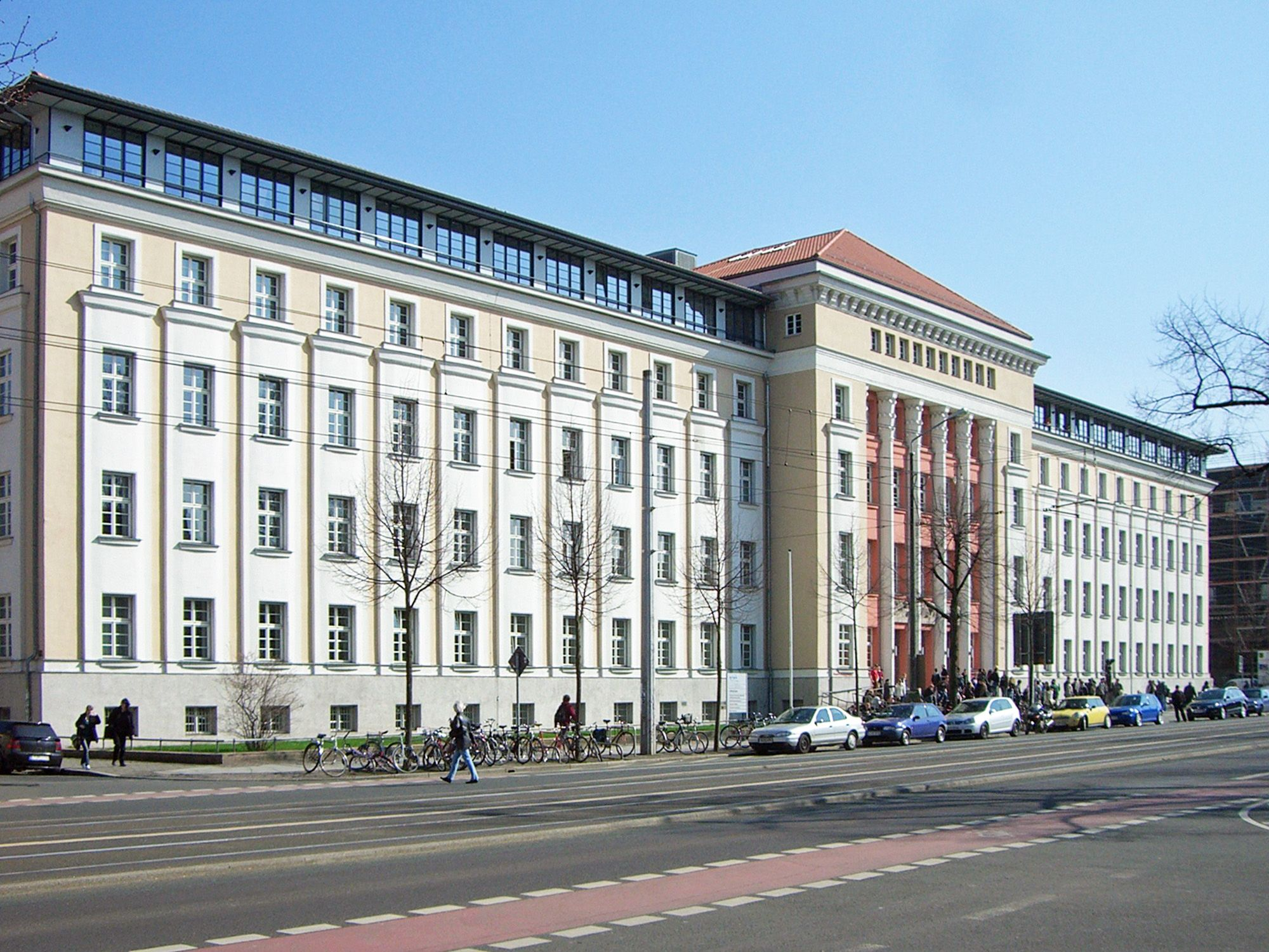 ehemaliges Gebäude der Oberpostdirektion Leipzig, erbaut 1922-1926; zwischen 1949 und 1990 Sitz des Rates des Bezirks Leipzig, 1990-1996 Sitz der Bezirksregierung, heute "Lipsius-Bau" der HTWK Leipzig